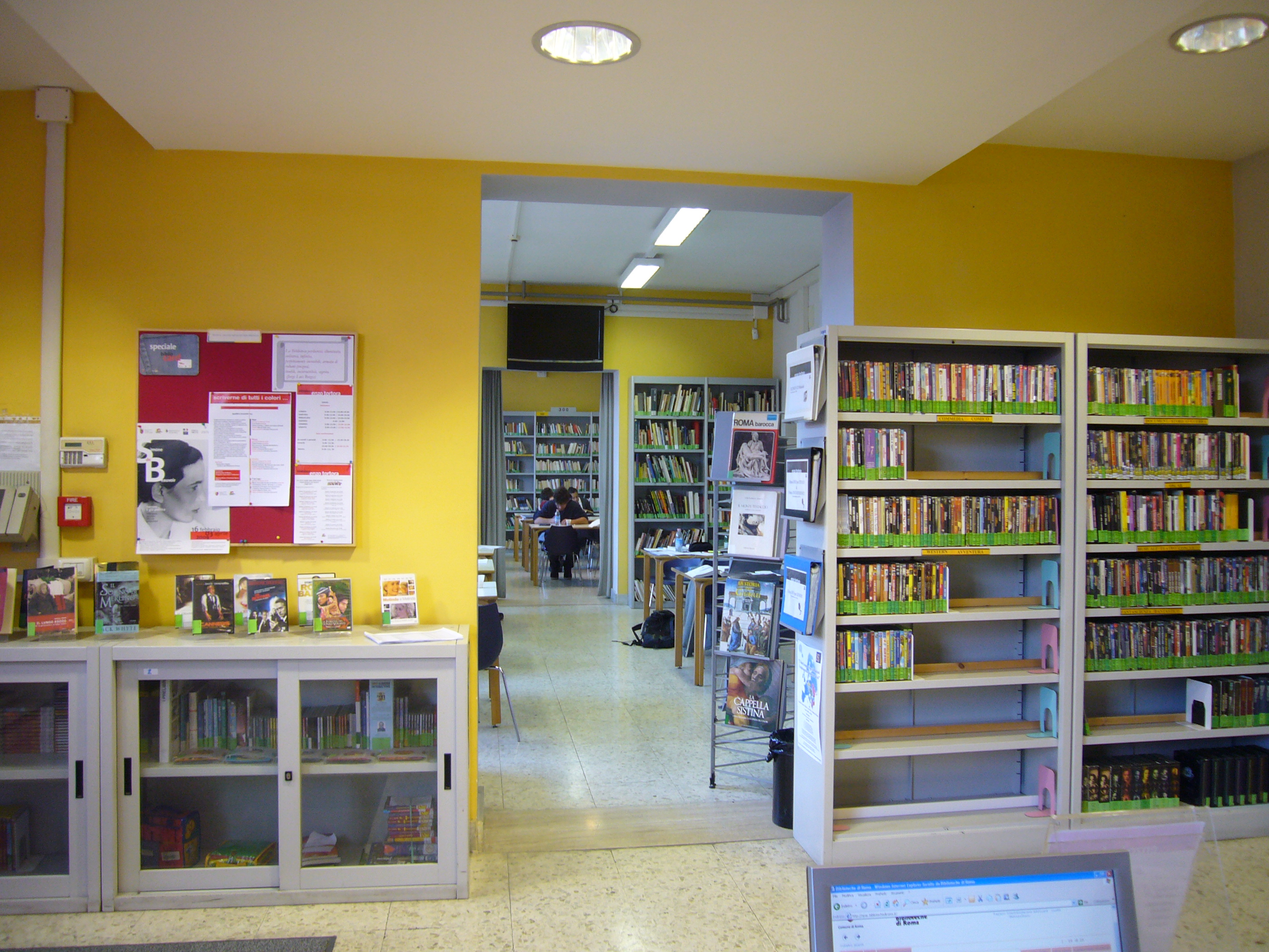 Roma, Biblioteca comunale Enzo Tortora a Testaccio